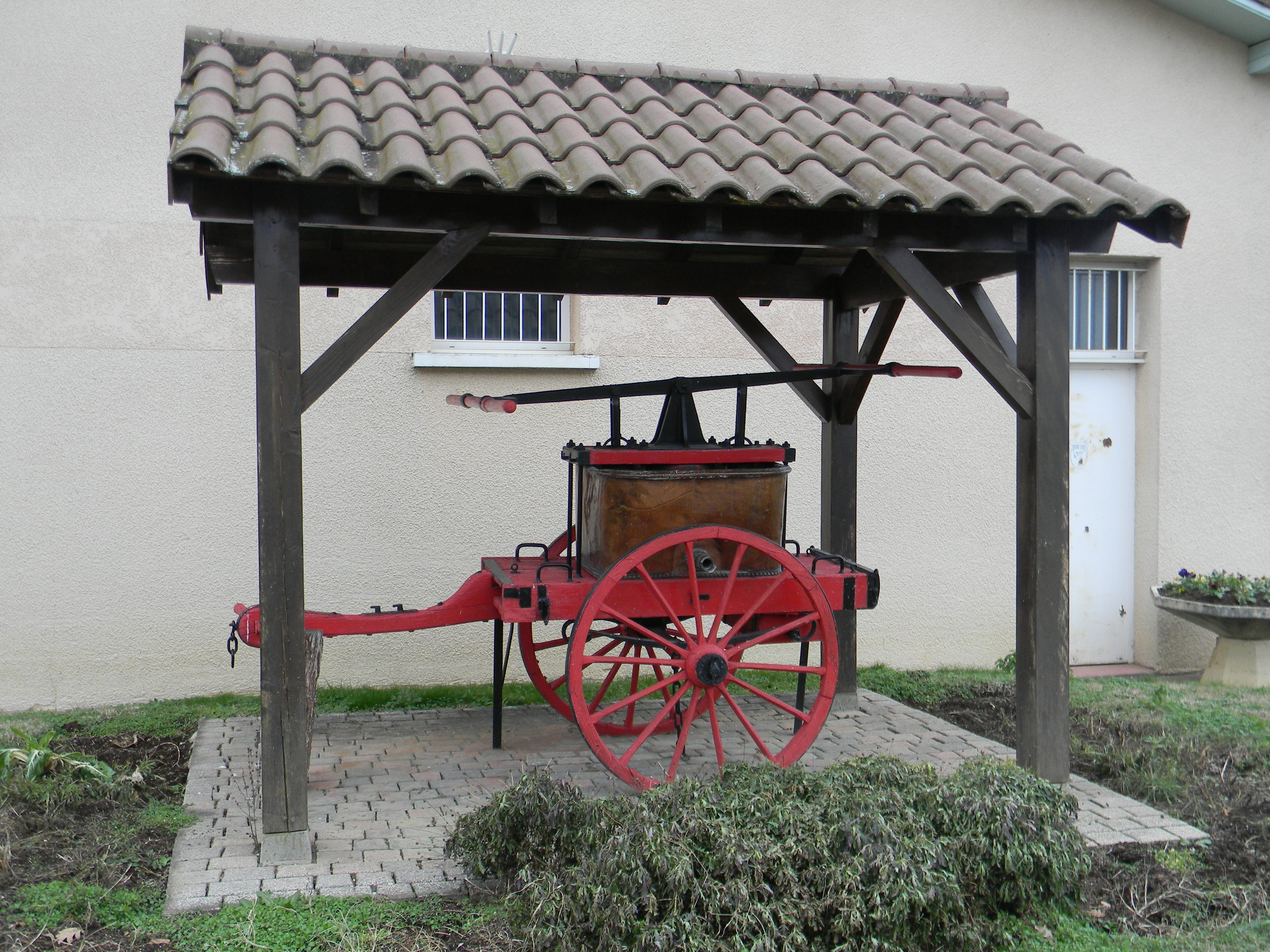 Ancienne charrette d'incendie exposée à Balan, dans l'Ain.